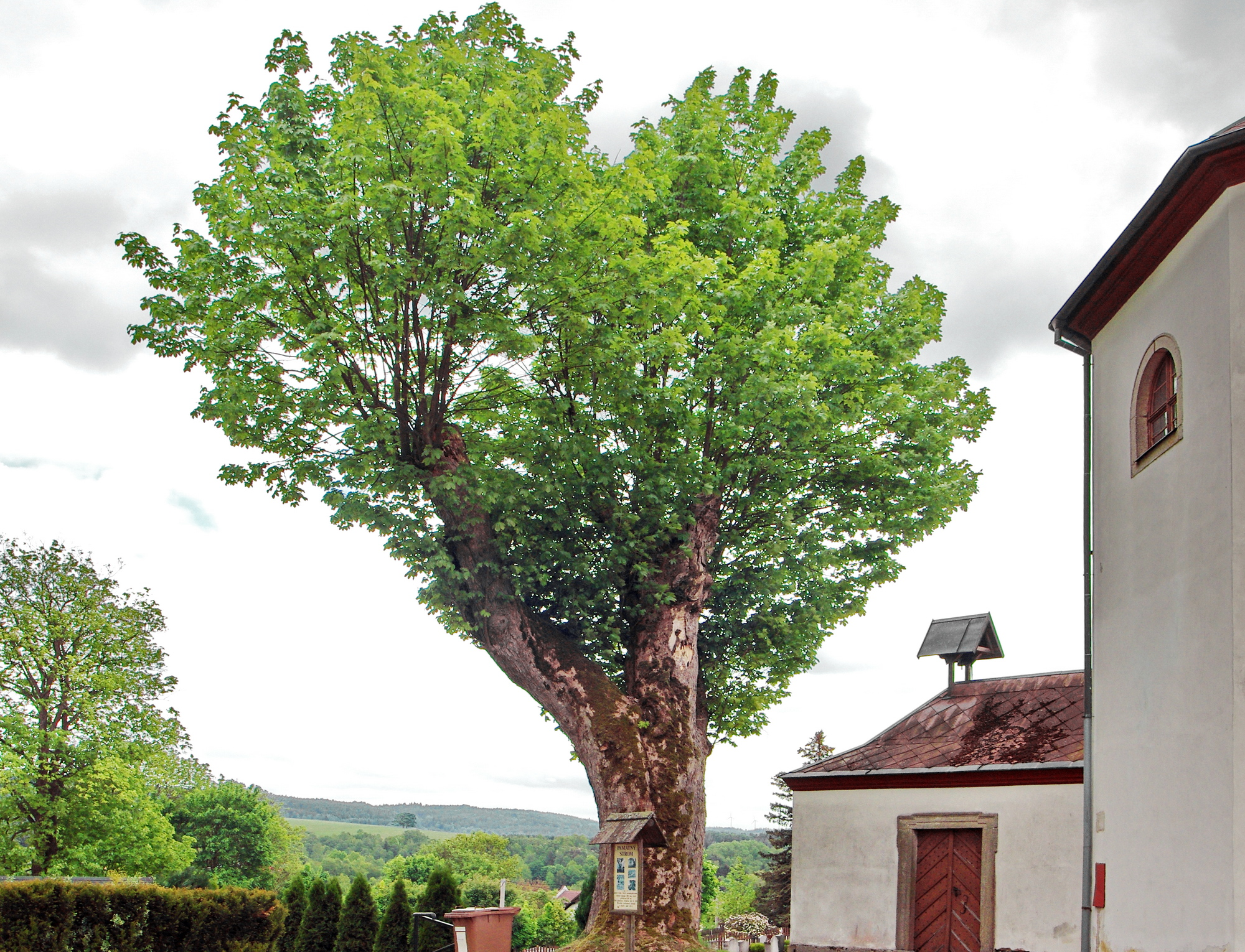 památné stromy Javory u kaple - torzo jednoho z javorů, Luby, okres Cheb